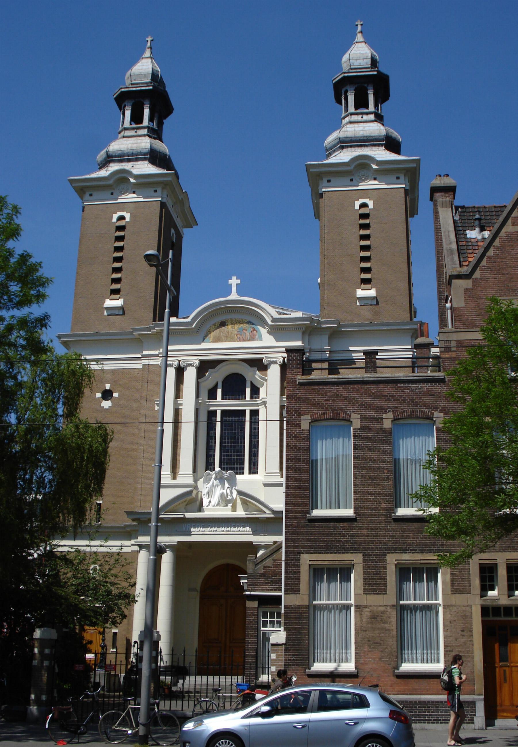 Rotterdam, Nieuwe binnenweg25. Paradijskerk. Rijksmonument.